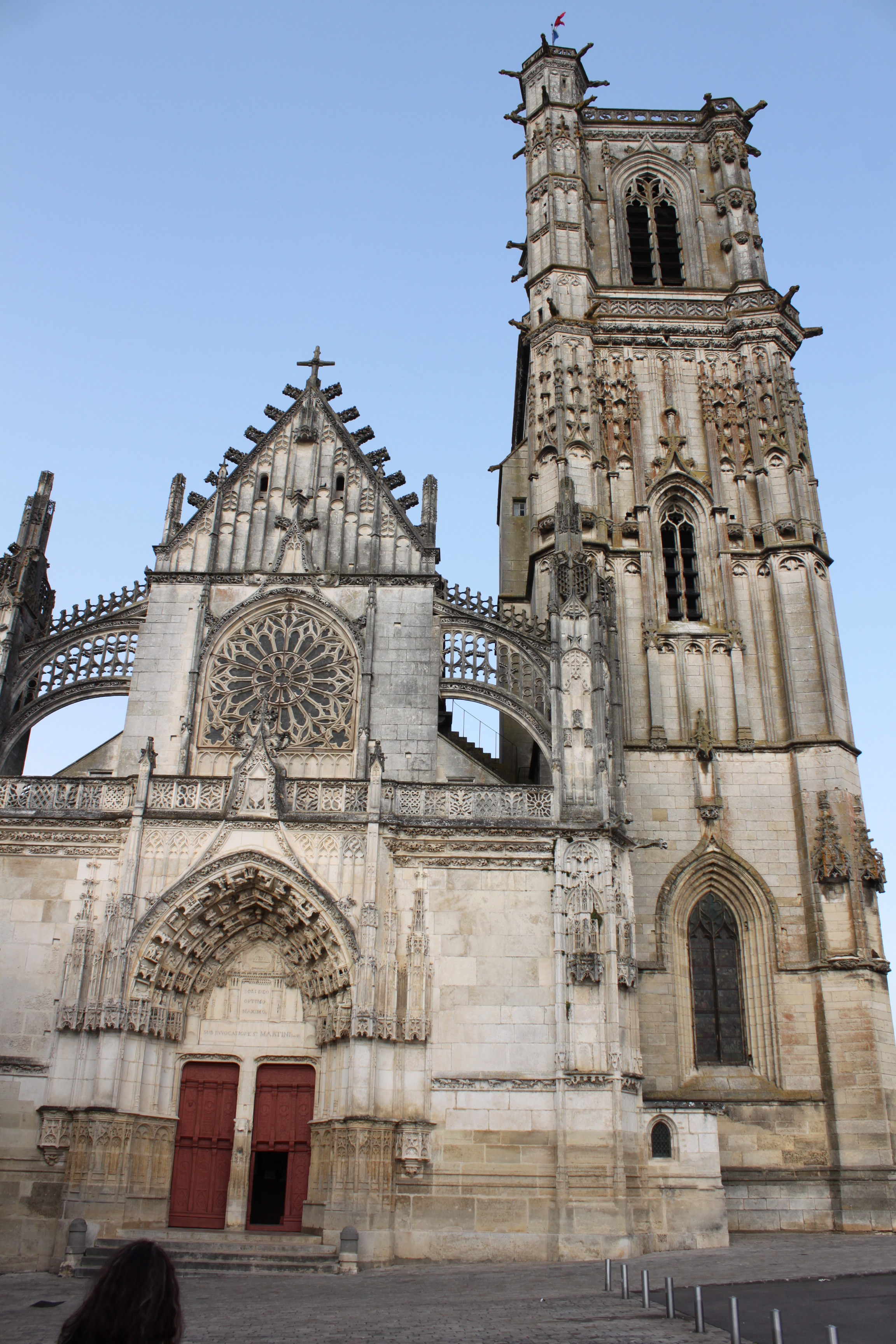 Clamecy, Nièvre, Bourgogne, France